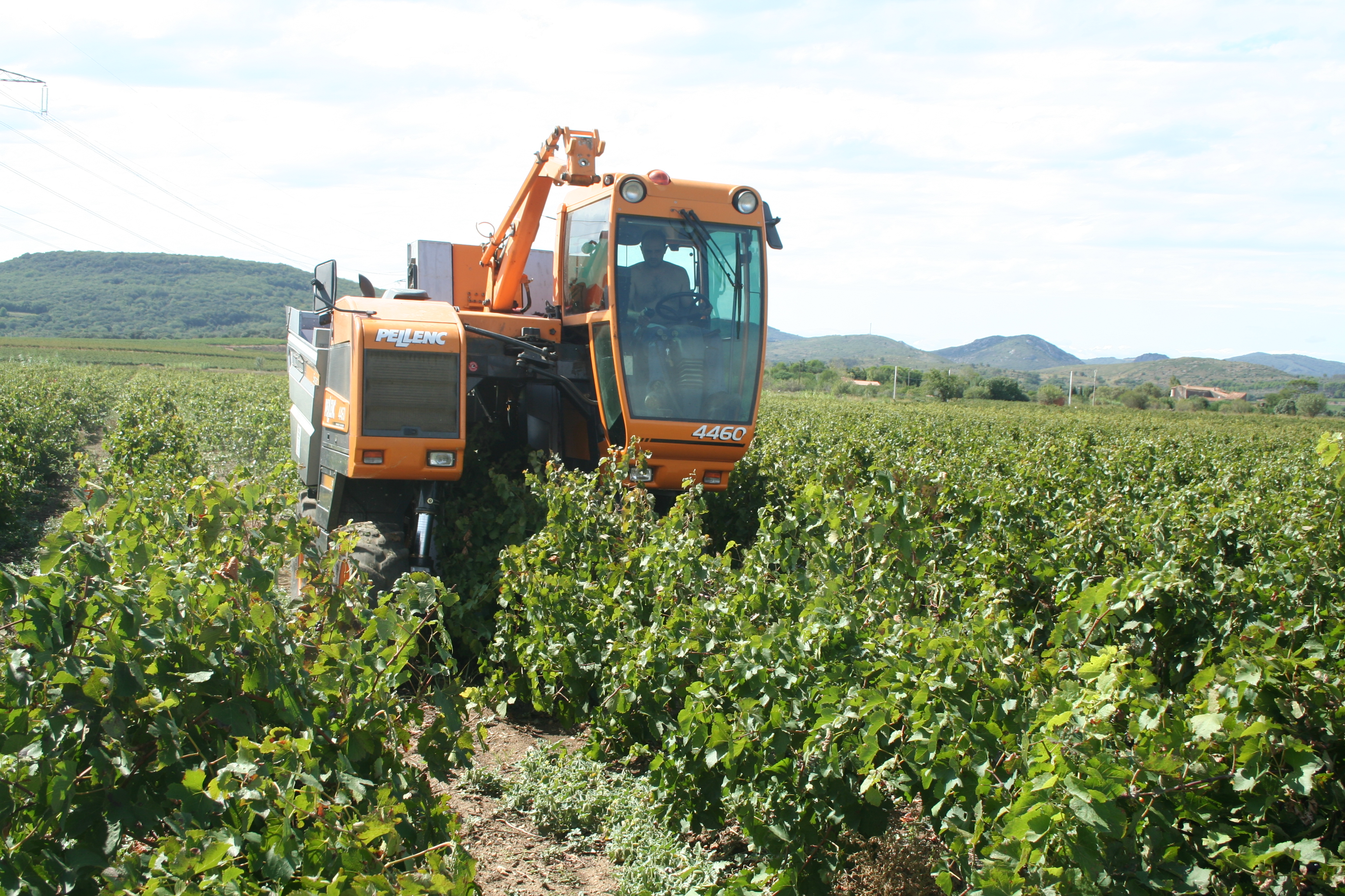 Pellenc 4460; Fontès (Hérault) - Machine à vendanger.